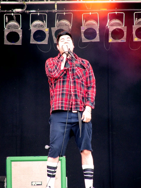 Chino from Deftones live @ Pinkpop Festival, Landgraaf